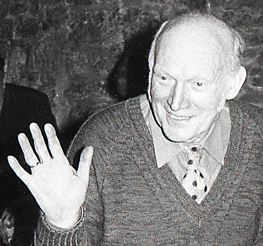 Albert Sulg